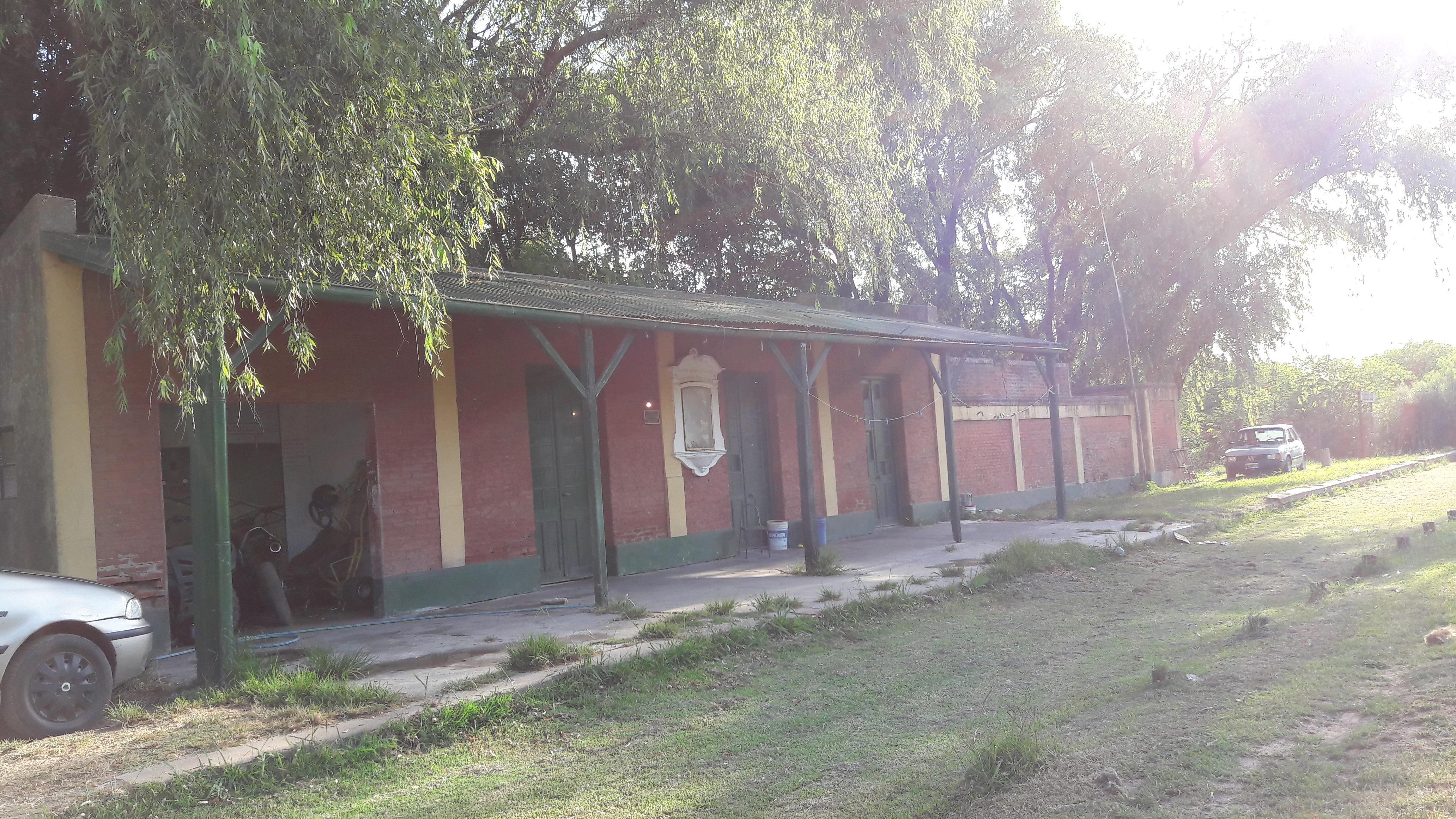 Fotografía de la estación